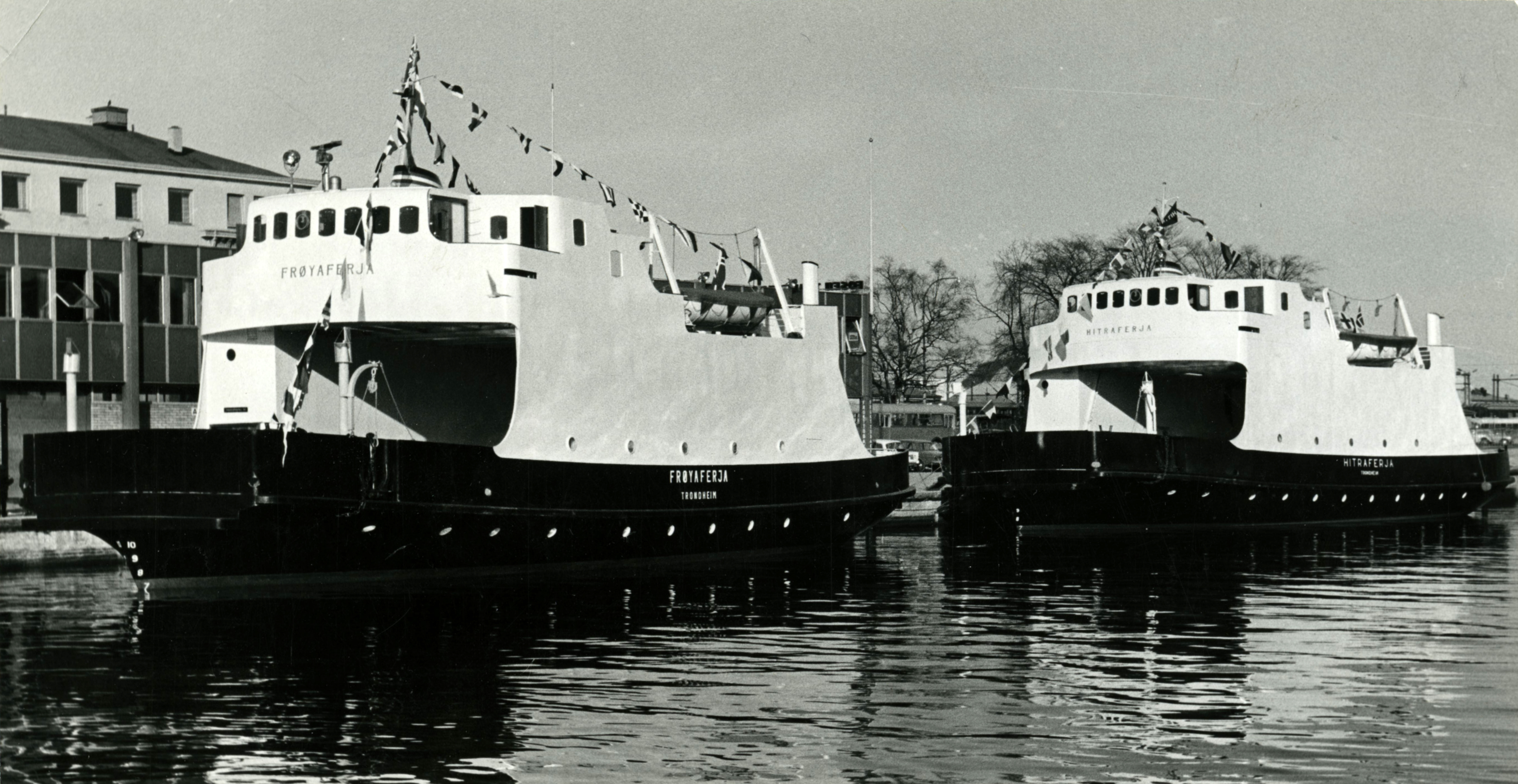 Frøyaferja og Hitraferja ved Fosenkaia (1964)